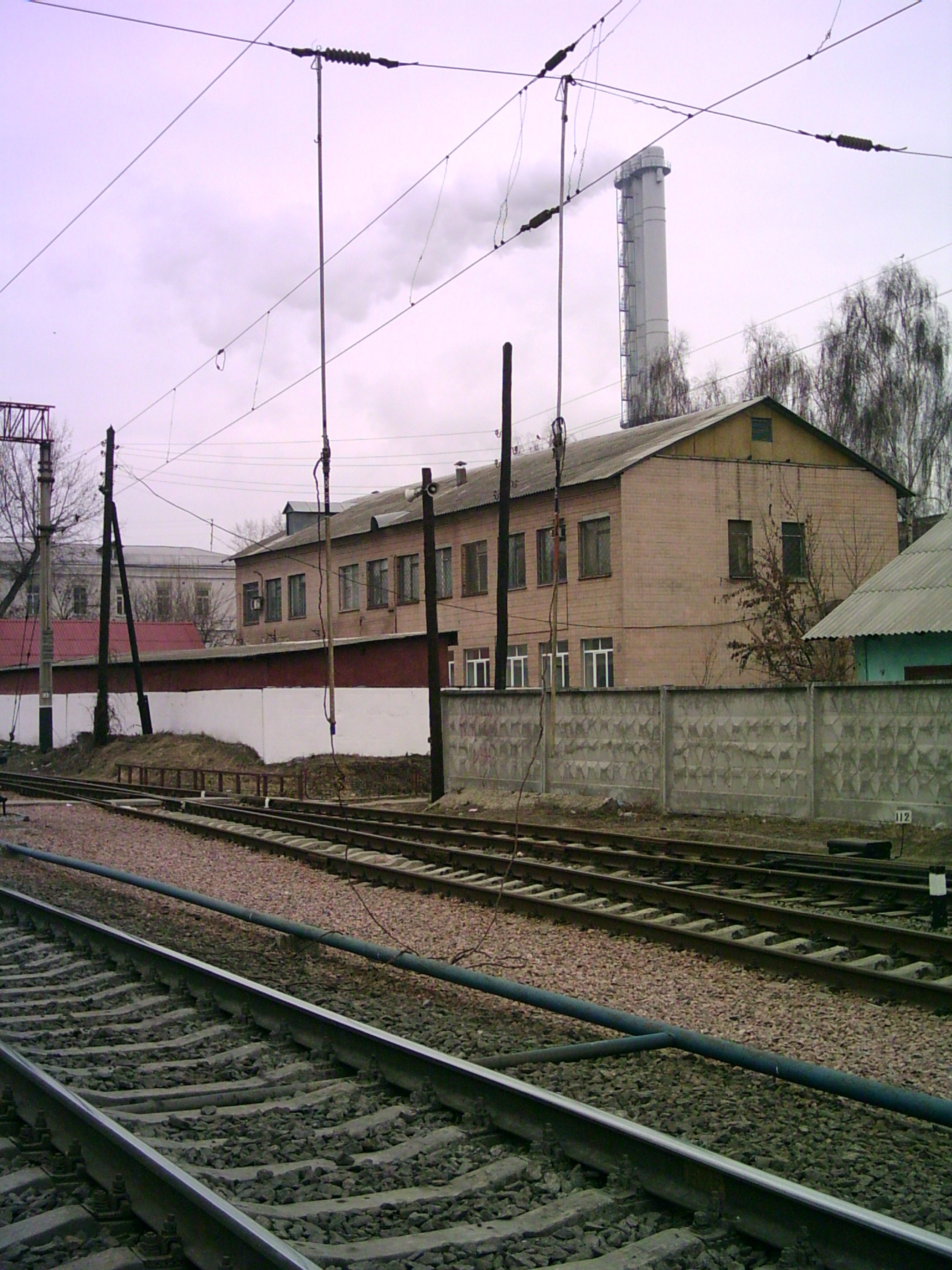 Заземление_участка_контактной_сети